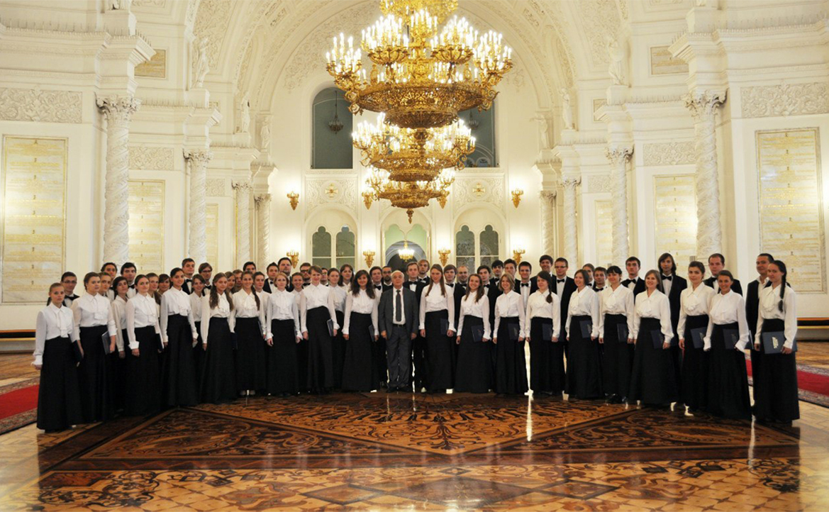 Хор Академического музыкального училища при Московской государственной консерватории им. П.И.Чайковского